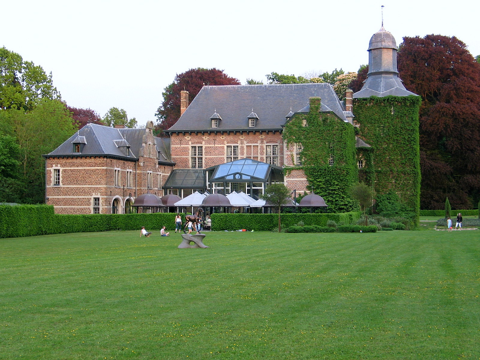 castle of Rullingen in Kuttekoven, Borgloon, Belgium